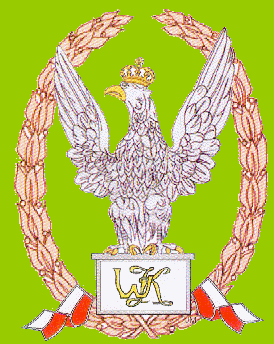 Odznaka Wzorowego Kadeta z 2002